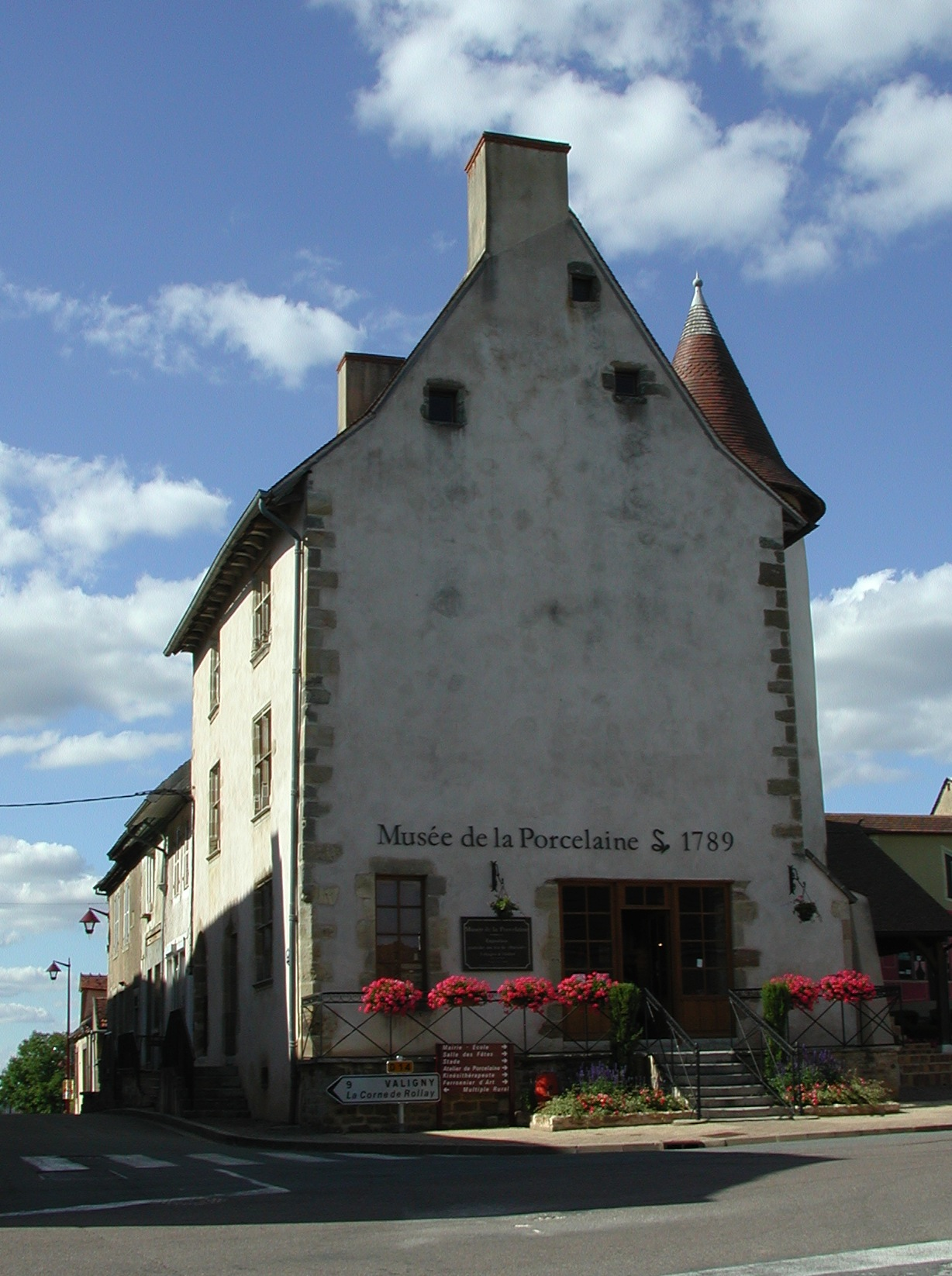 Maison dite de Charles IX et musée de la Porcelaine à Couleuvre (Allier, France).